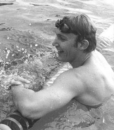 Detlef Grabs